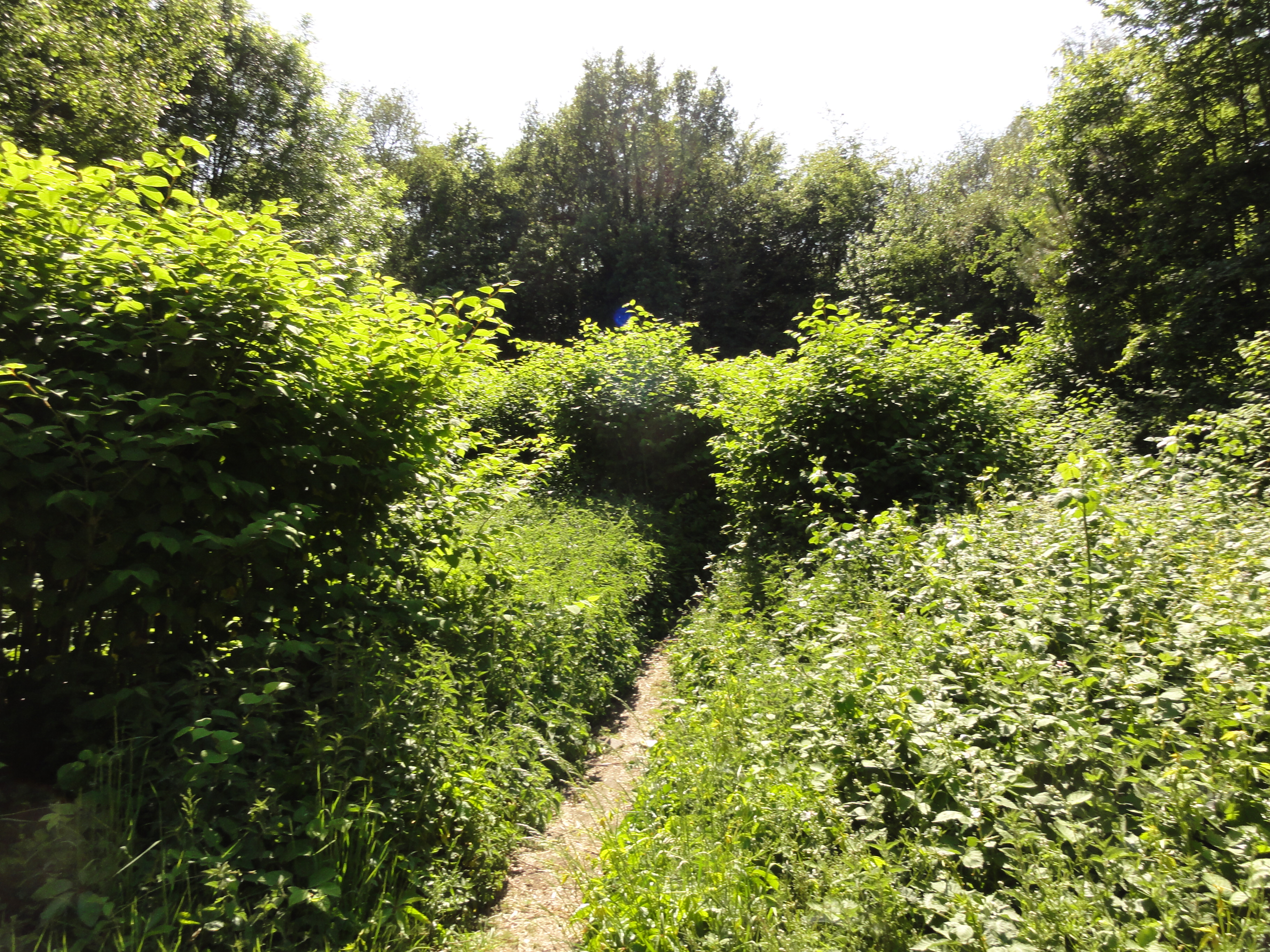 Terril n° 219 dit Vicoigne n° 2, Fosse n° 2 de la Compagnie des mines de Vicoigne, Raismes, Nord, Nord-Pas-de-Calais, France.